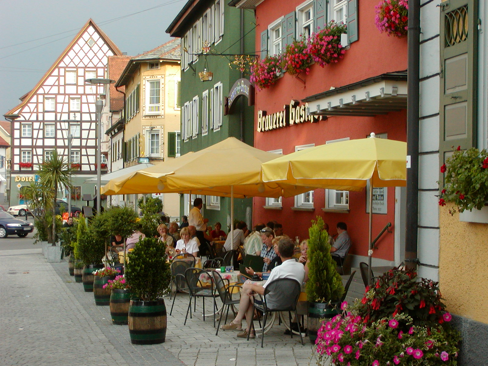 Montfortplatz in Tettnang, Deutschland.